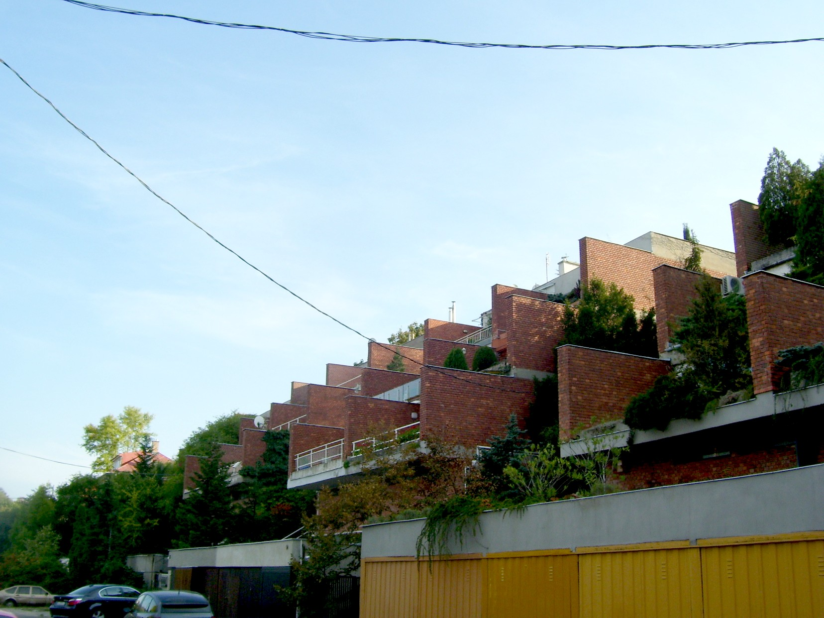 Budapest, XI. Meredek utca 50-56. alatti teraszházak, épült 1968-ban